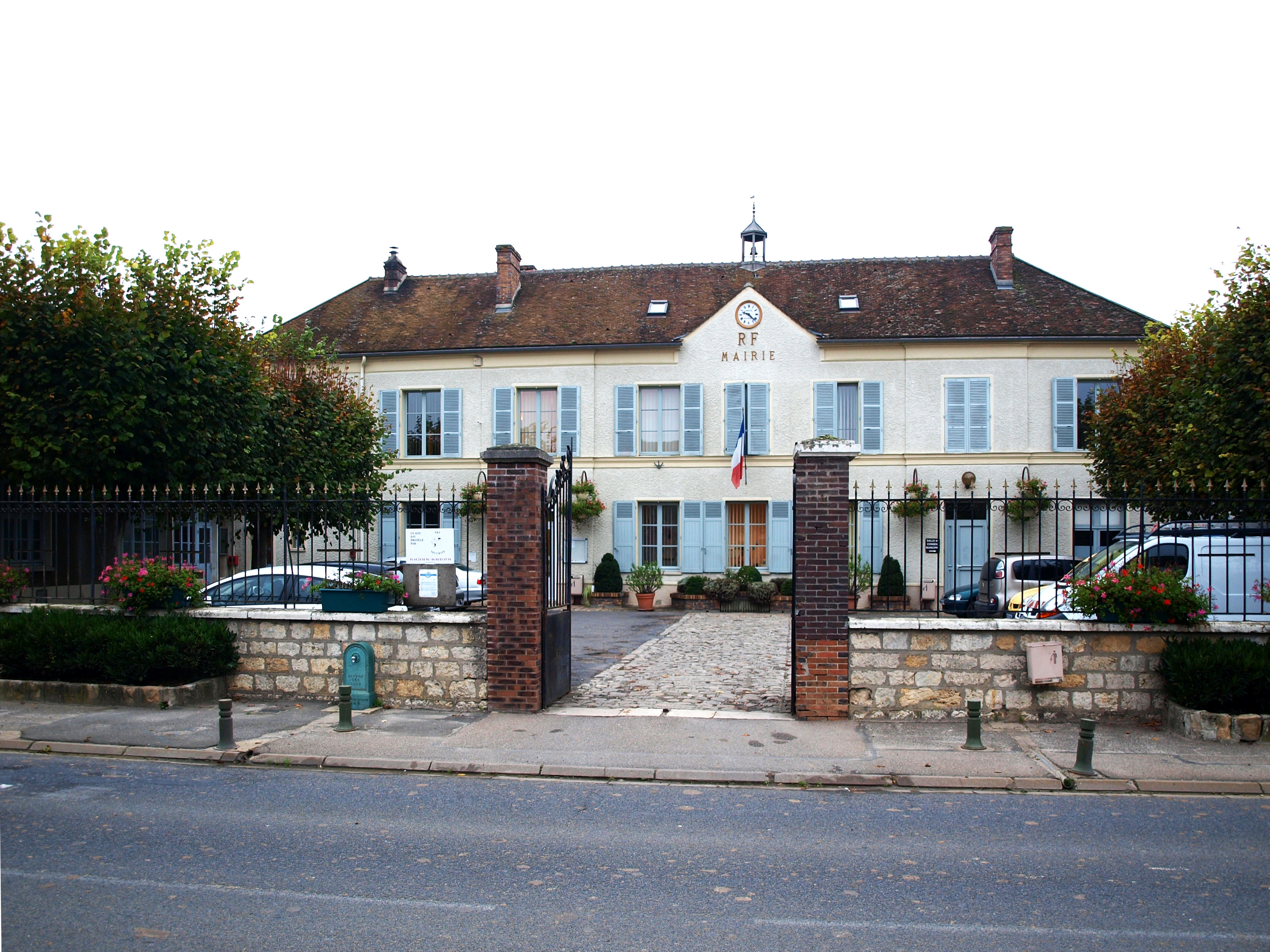 La Chapelle-la-Reine (Seine-&-Marne, France)